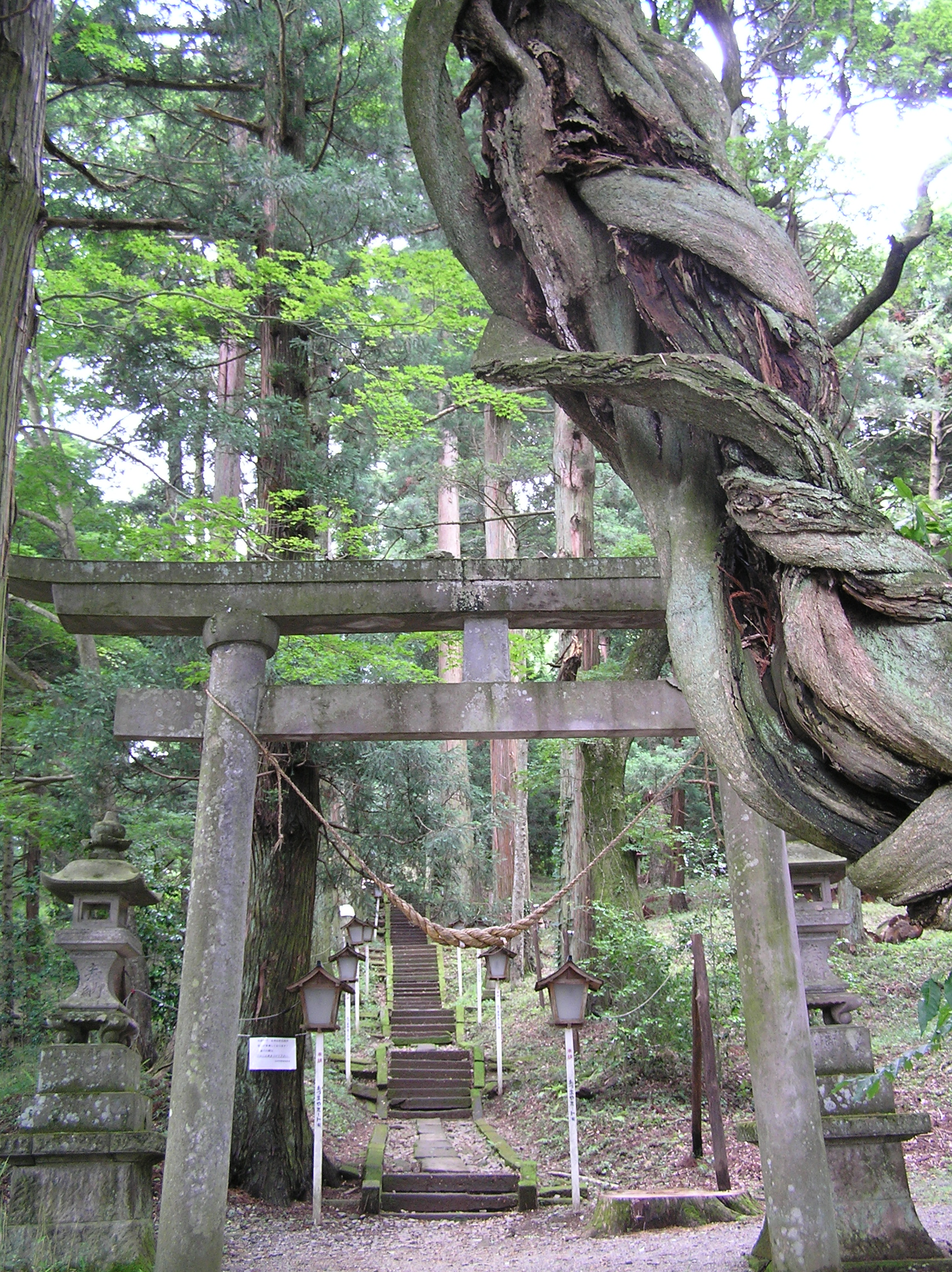 白河の関 参道 Olympus C-770UZ